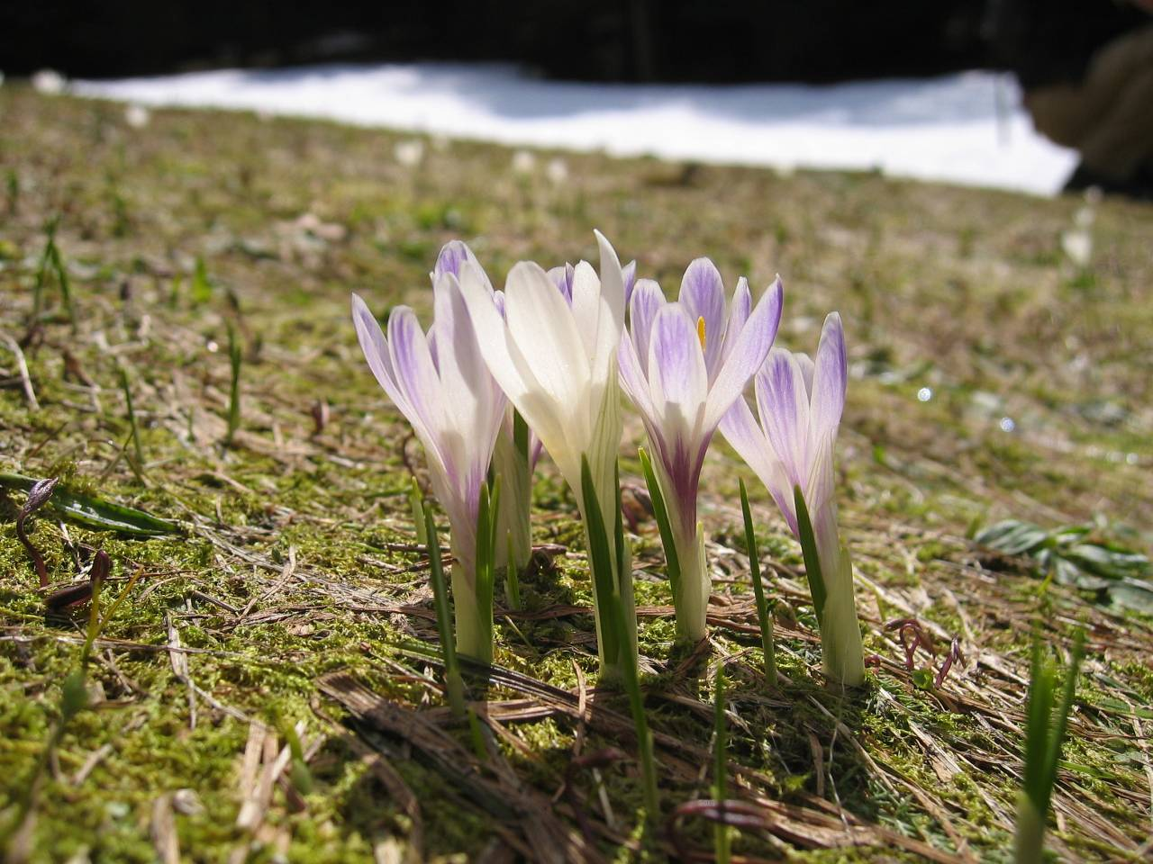 Crocus vernus subsp. albiflorus Habitat: Roßleithenreit, Windischgarsten, Austria (1.200 m)